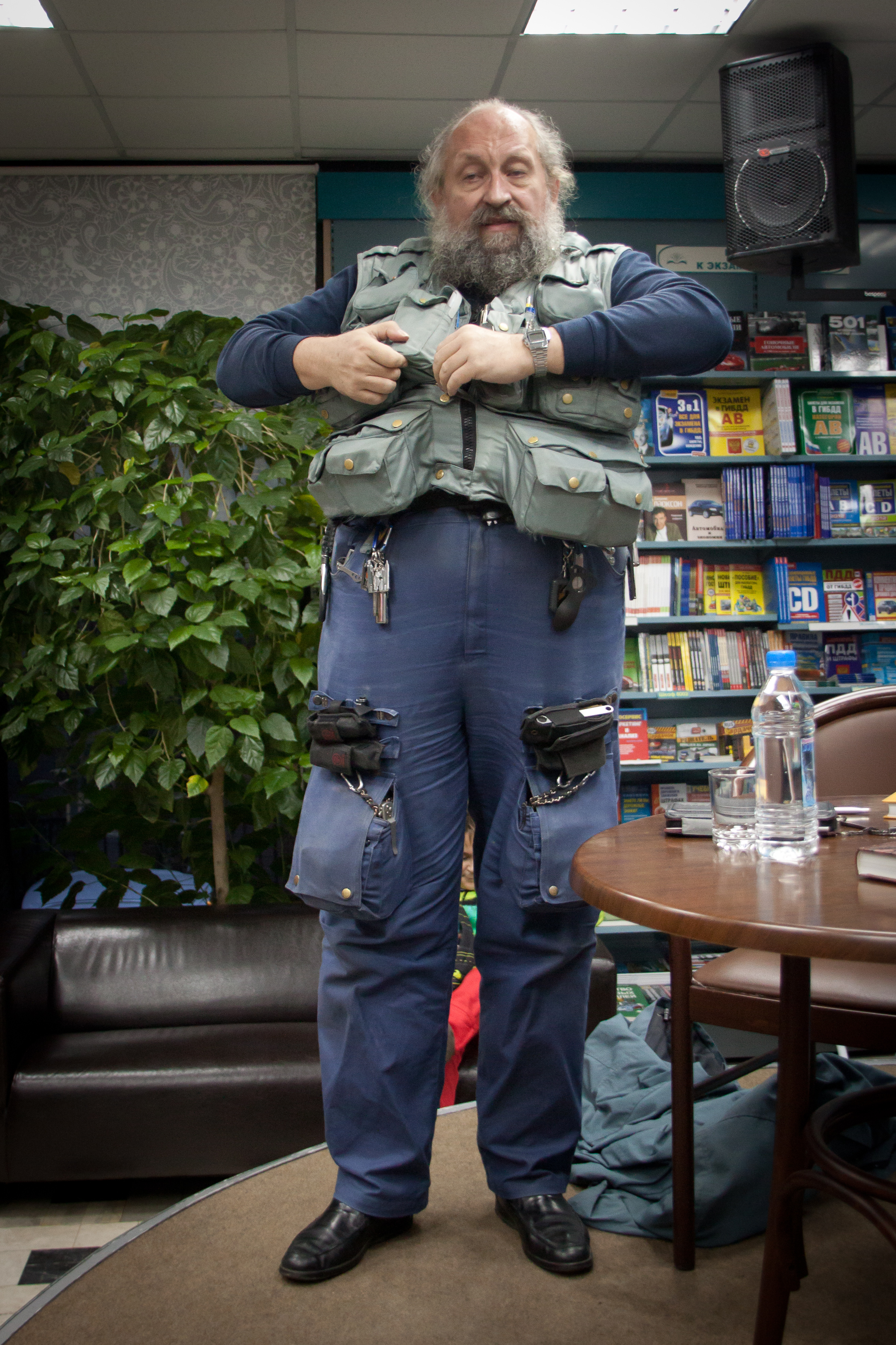 аналитик, журналист и игрок "Что? Где? Когда?" Анатолий Вассерман и его знаменитый жилет